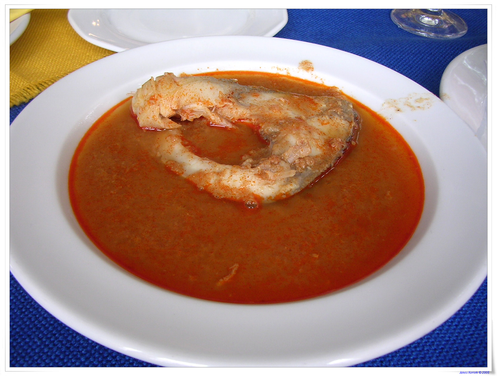 Halászlé served near Lake Balaton